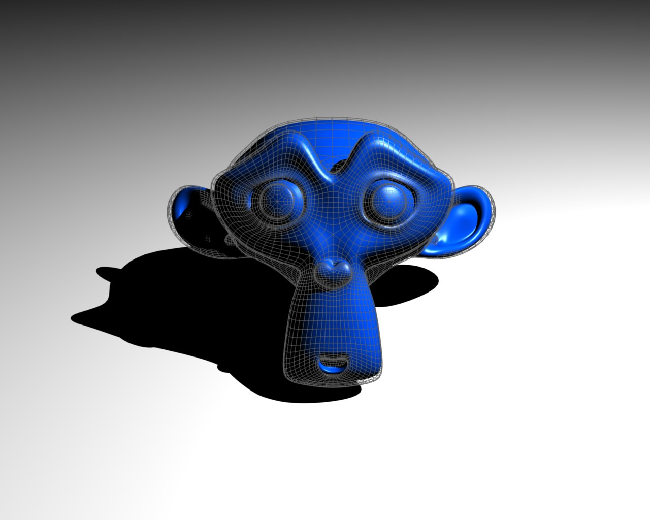 Suzanne - blender's sample monkey model. Rendered in Blender internal.